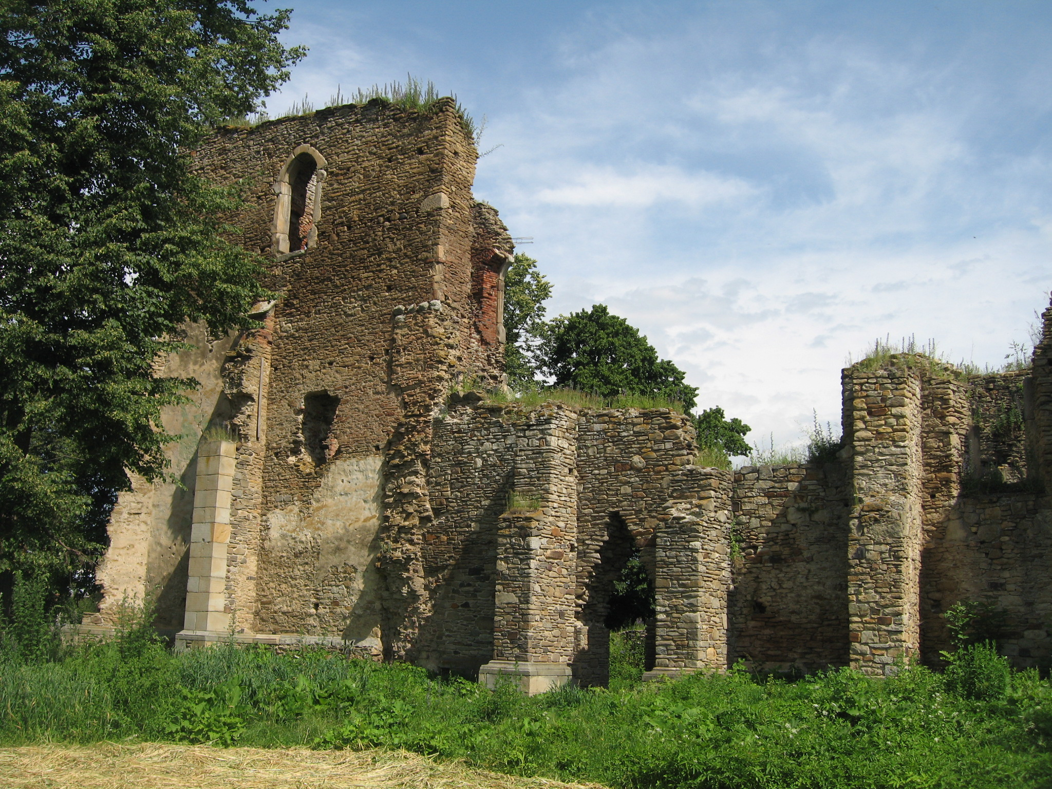 Catedrala Catolică din Baia